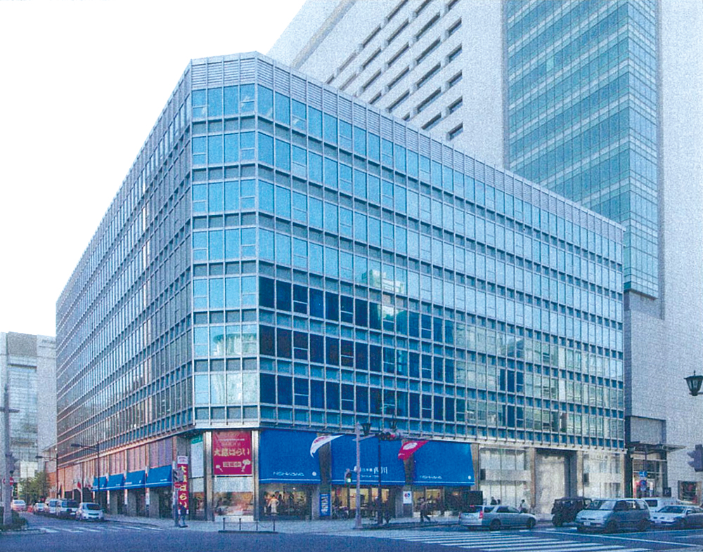 古河ユニック本社